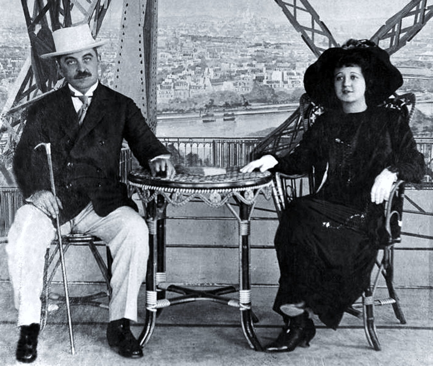 Nikolaus Ritter von Wassilko und 2. Gattin Gerda Walden, Paris 1910/12